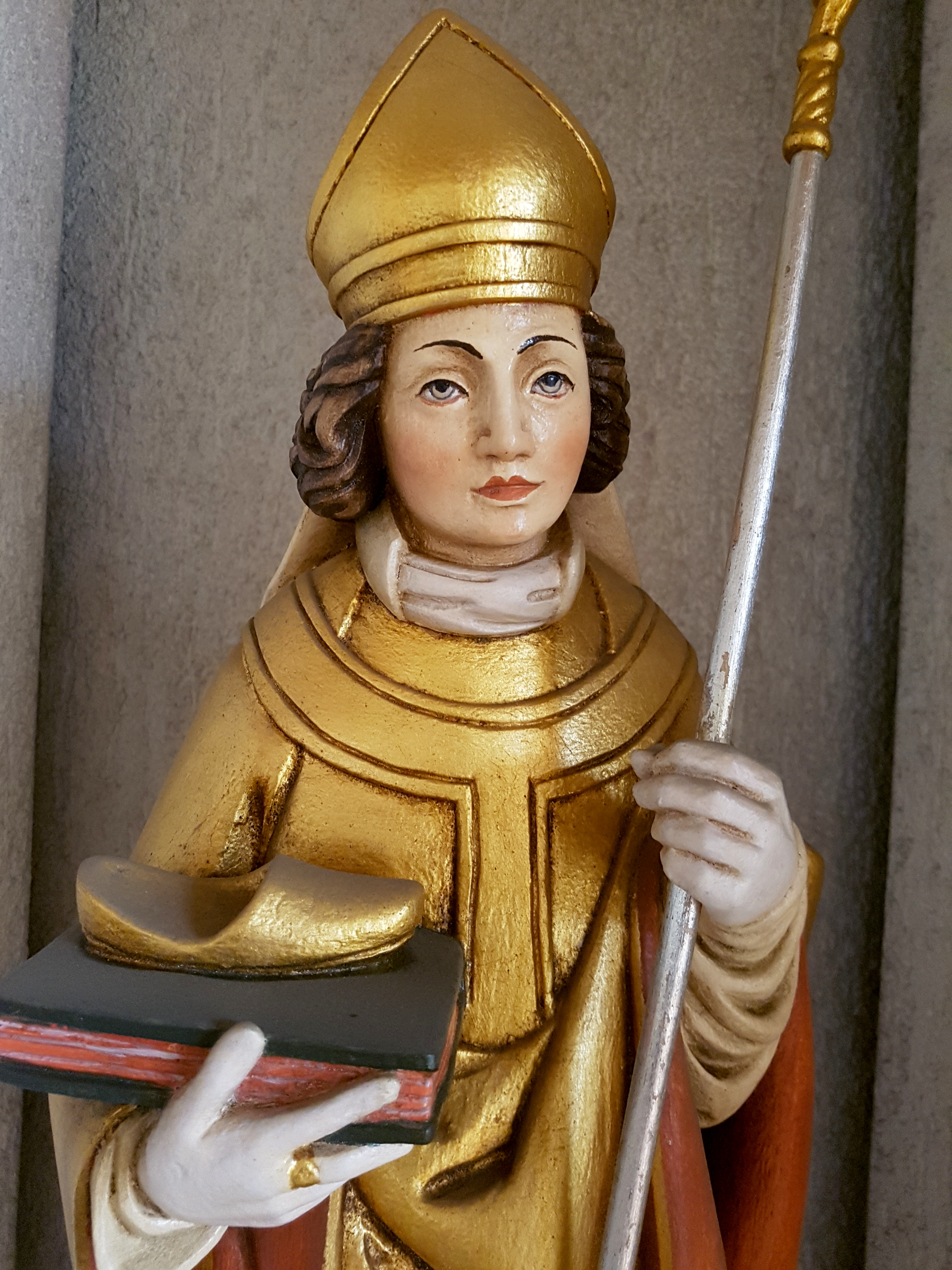 Estatuilla de san Vigilio en la sacristía de la iglesia Nuestra Señora de Pompeya (conocida también como parroquia italiana o de los migrantes), Bustamante esquina Jofré; comuna de Providencia, Santiago de Chile.